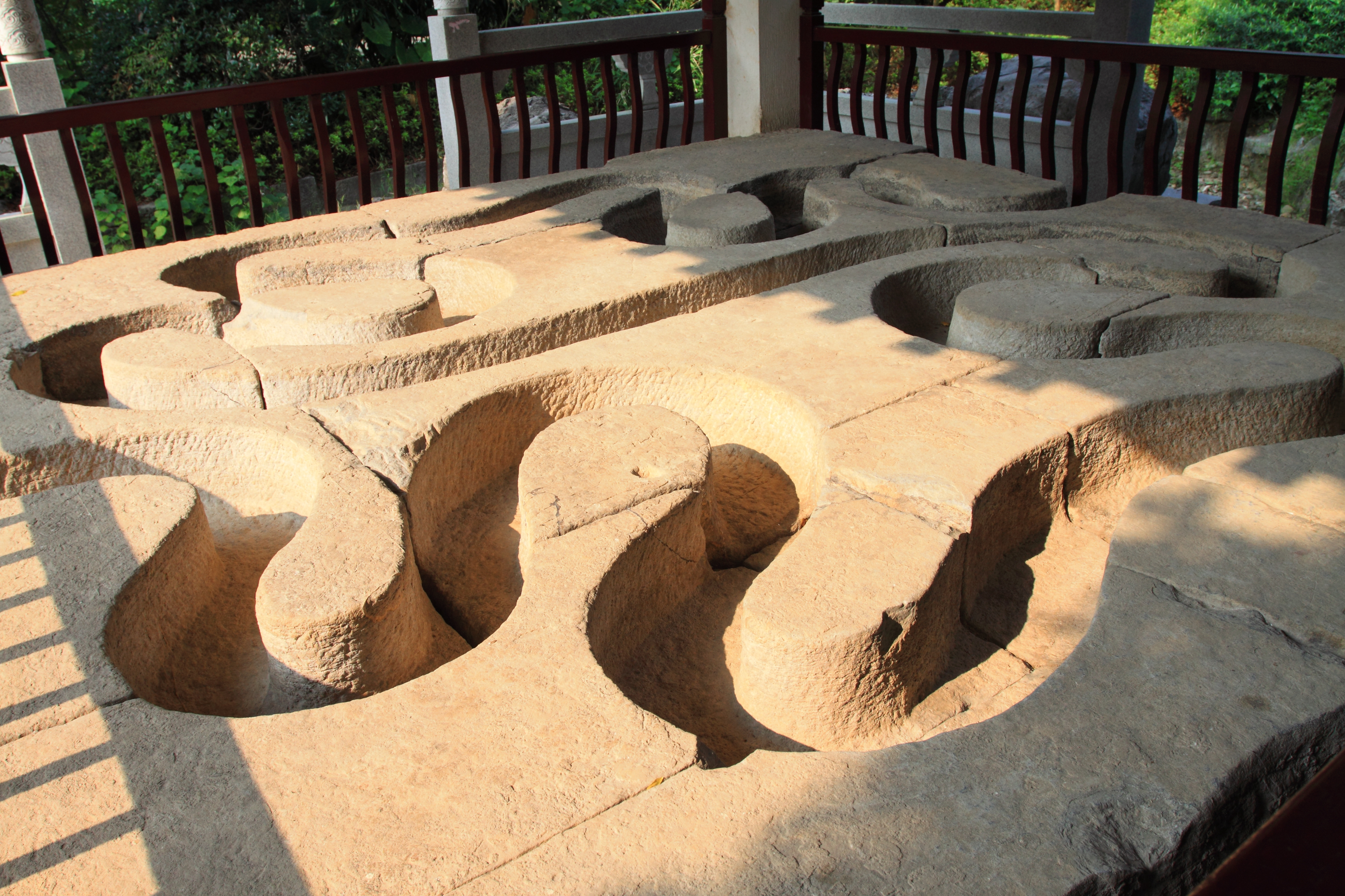 桂海碑林博物馆——曲水流觞，1996年10月出土于桂林滨江路与东华路交汇处，据考证为宋代遗物，是桂林已发现的最大的曲水流觞石刻